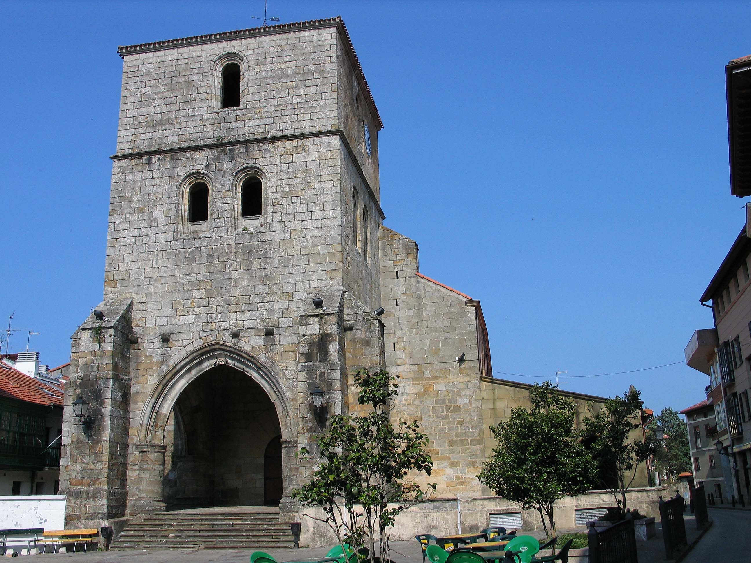 Iglesia de Plencia Photograph: Luidger (23. Juni 2006)